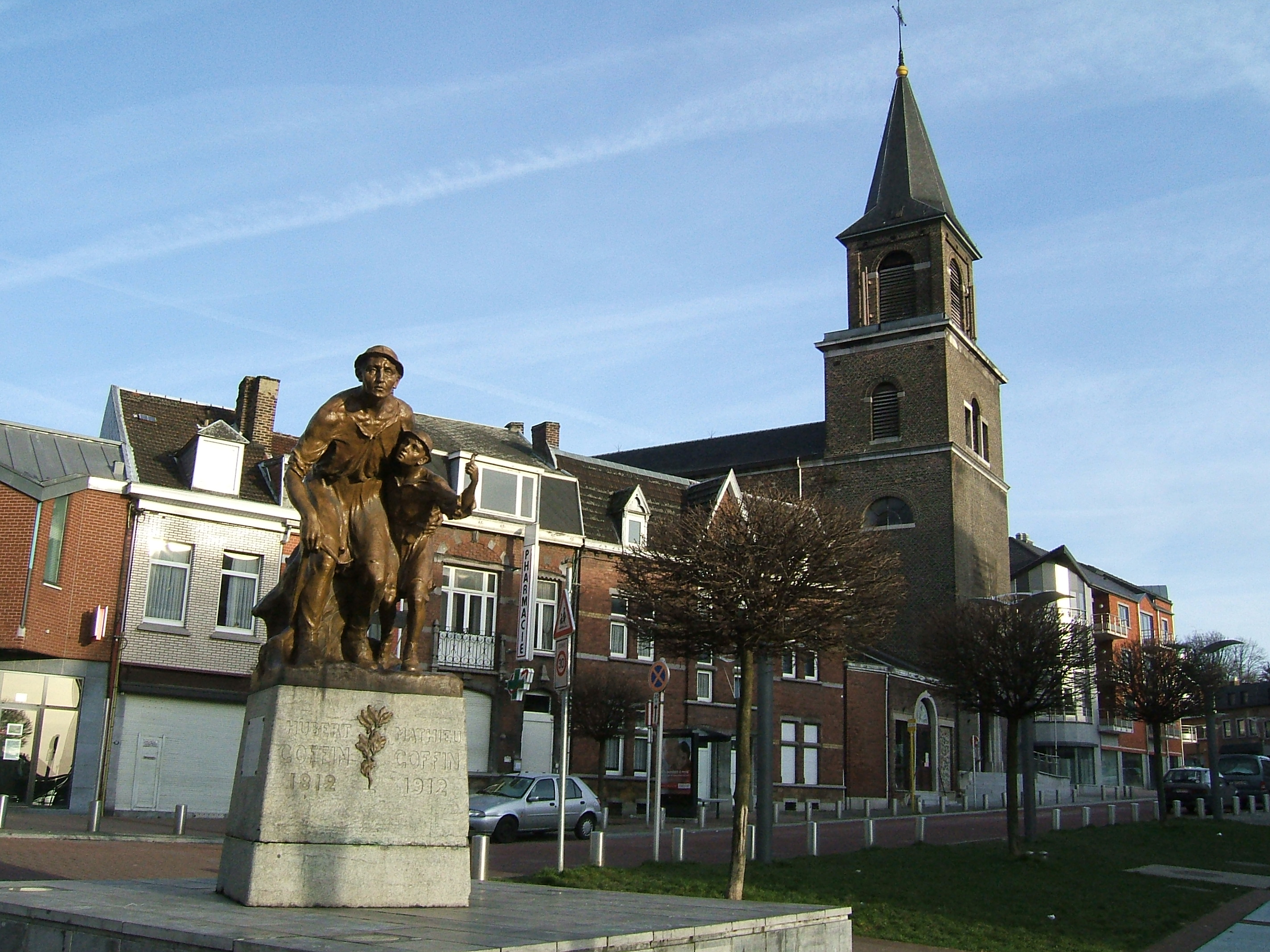 Place Nicolaï, Ans.